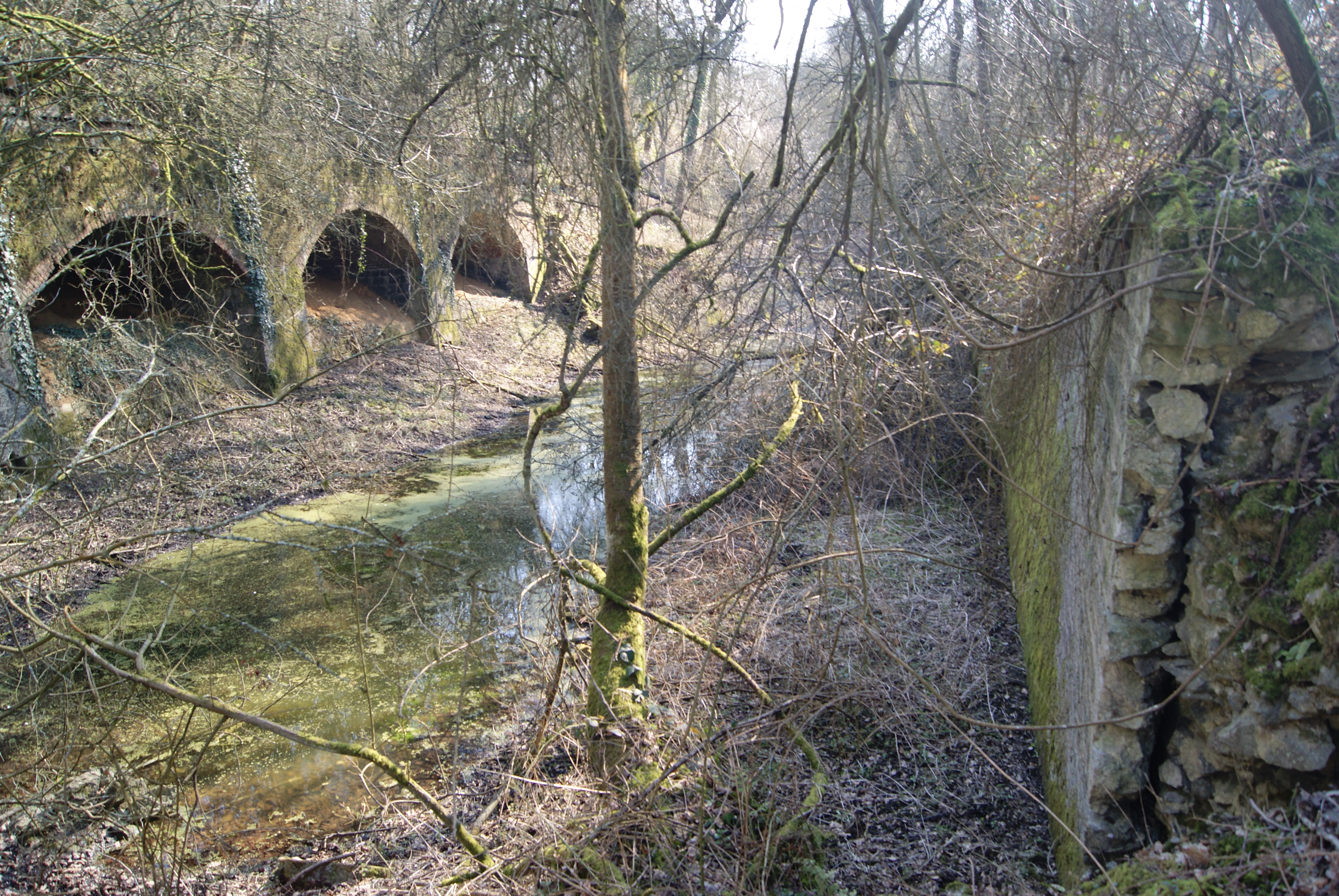 Fossé Séré de Rivières, au nord, vue depuis l'ouest - nord ouest, avec à droite le mur d'escarpe.